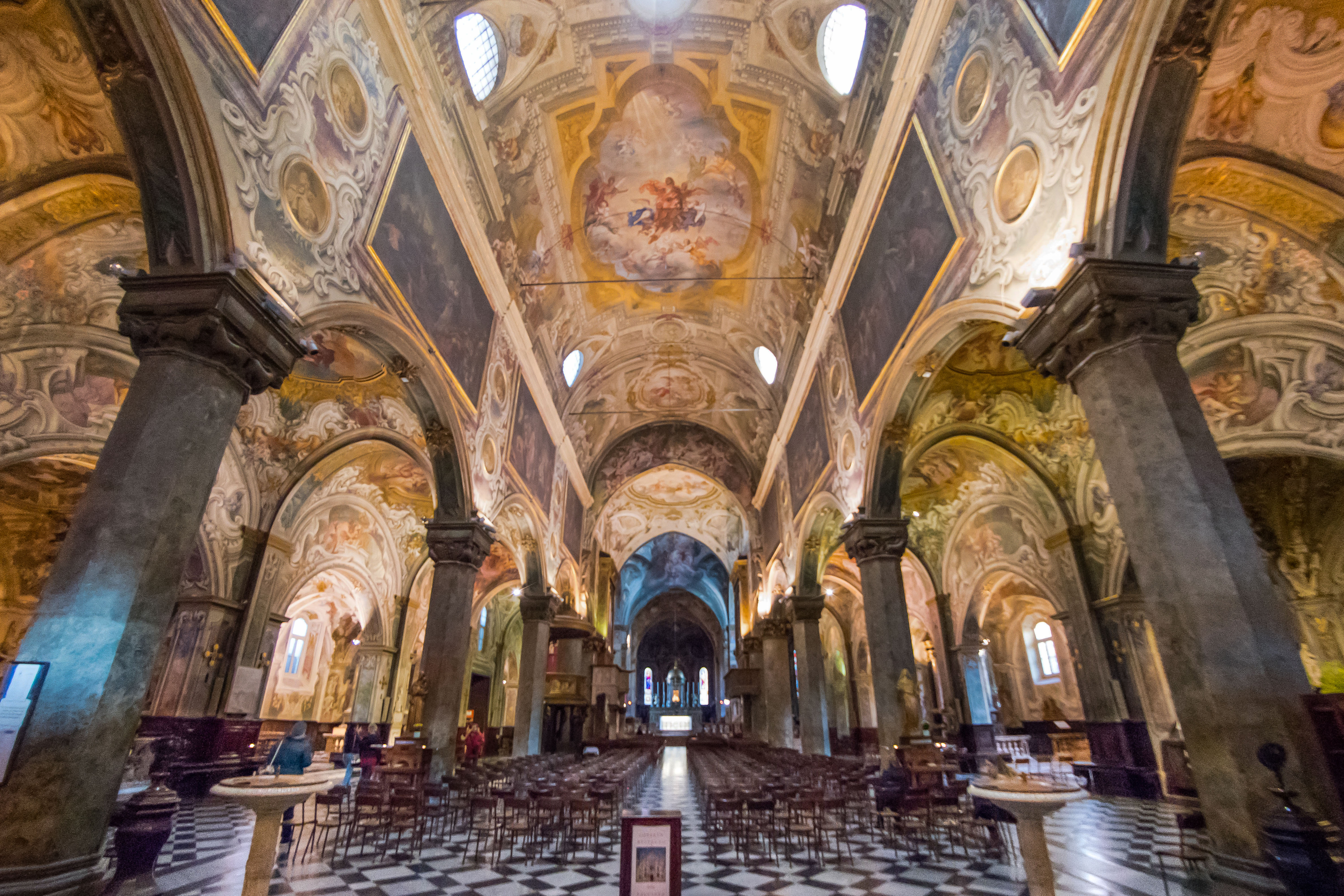 Navata centrale del Duomo di Monza